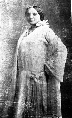 Portrait d'Esther Razanadrasoa